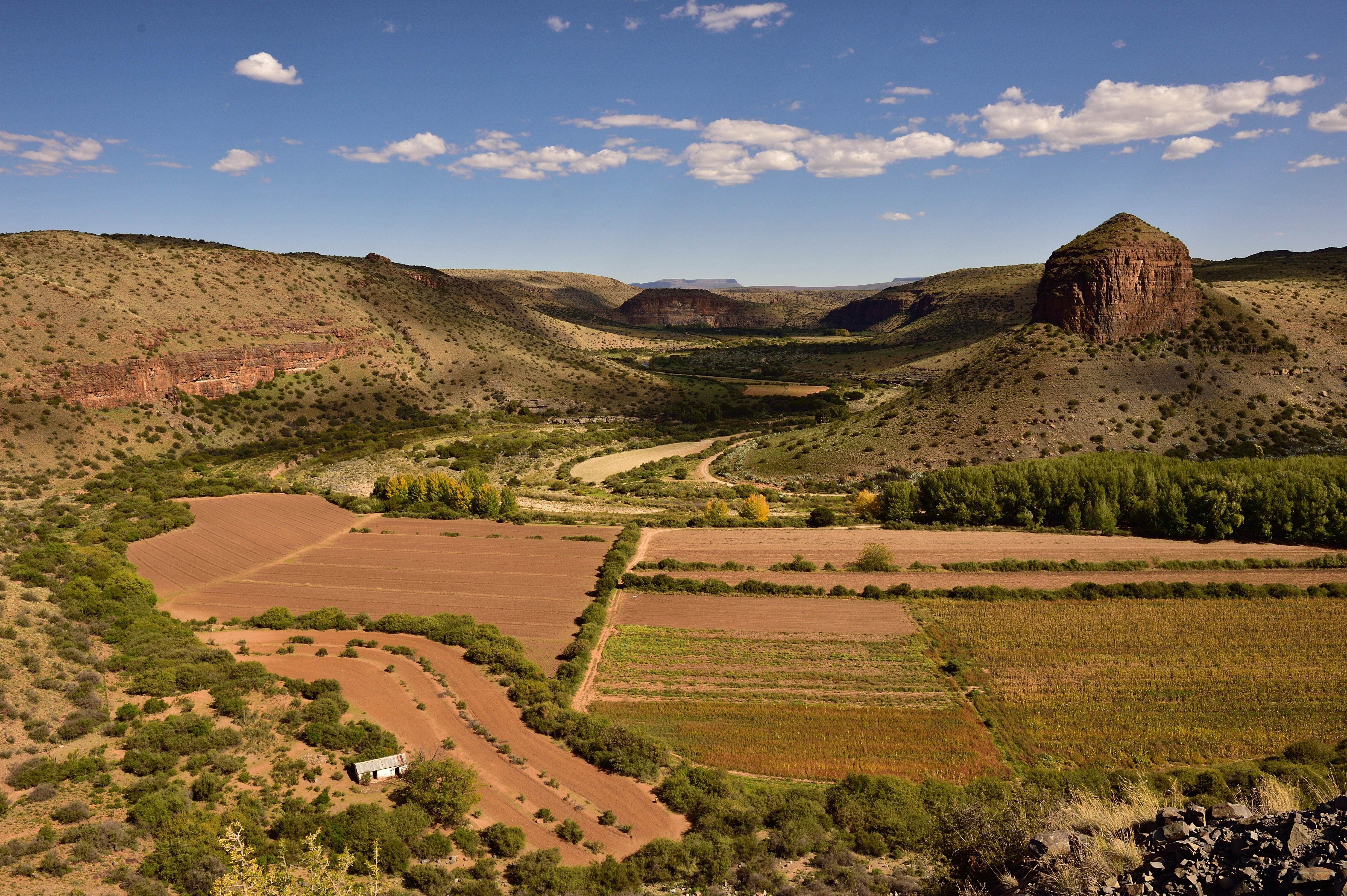 Vue de l'Eastern Cape en Afrique du Sud.